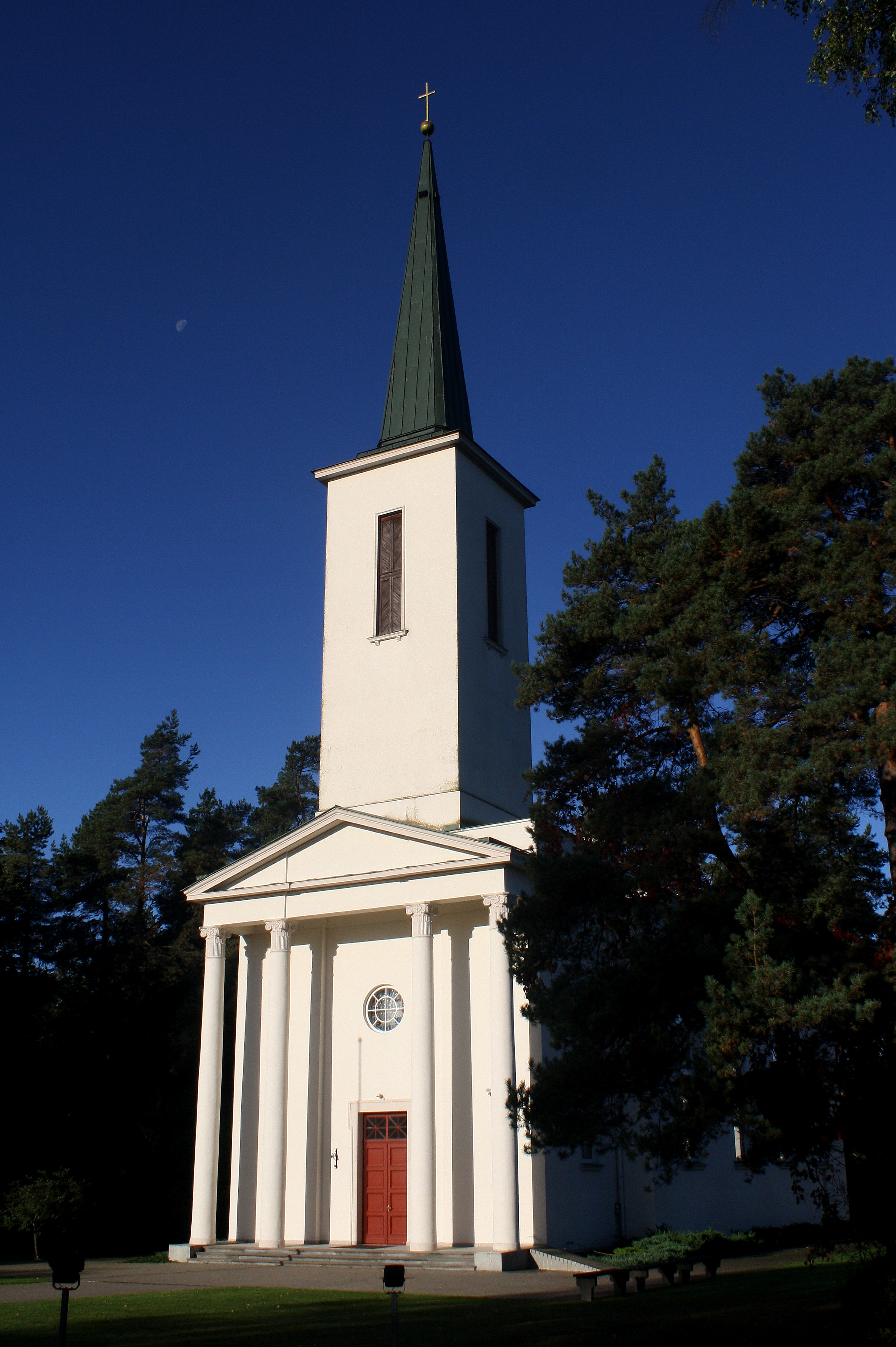 Ikšķiles luterāņu baznīca, Ikšķile